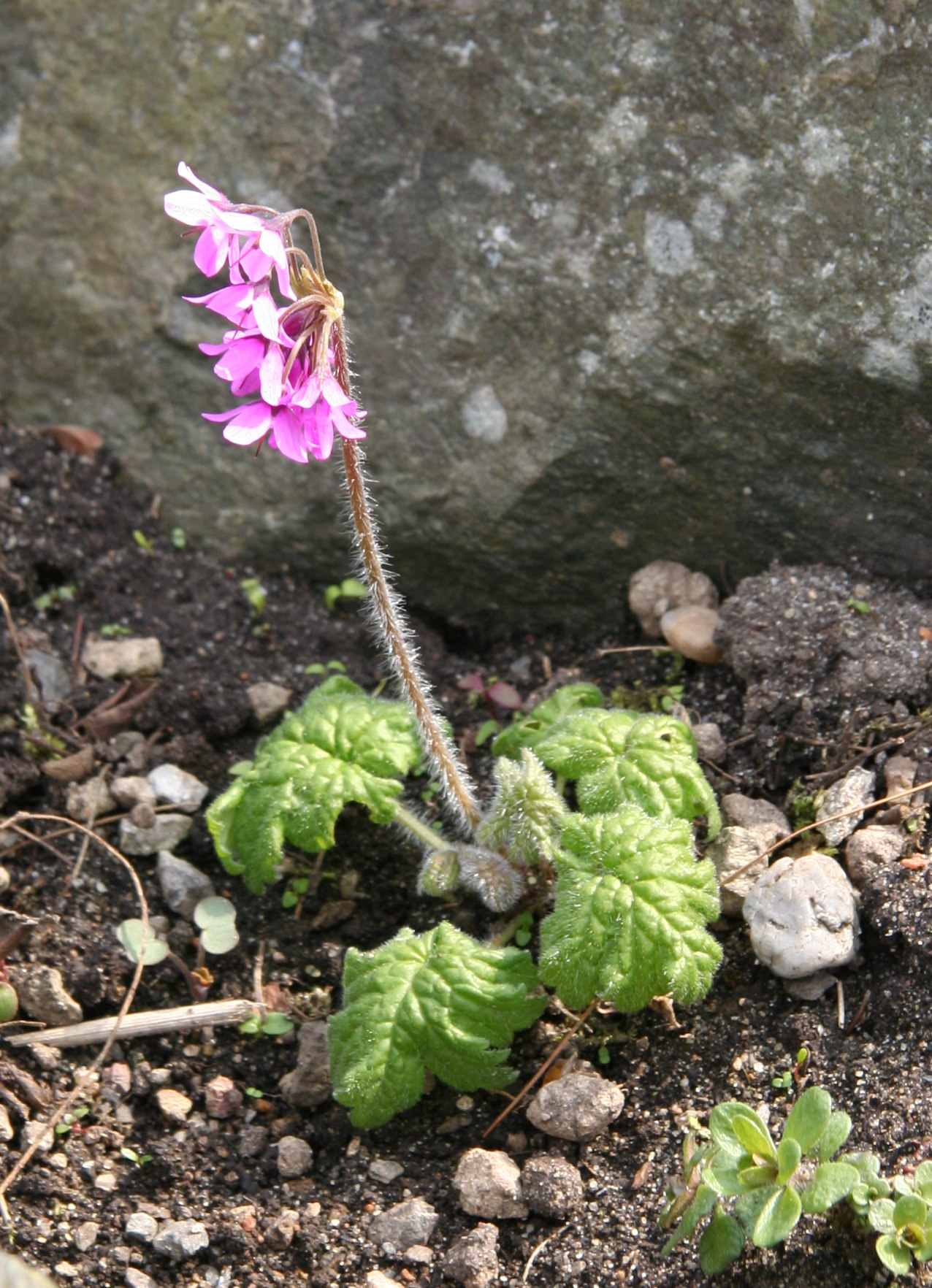 Cortusa matthioli subsp. pekinensis im Botanischen Garten Dresden